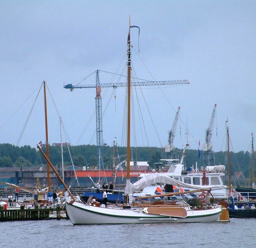 DE GROENE DRAECK neemt de vlootschouw af op Sail Amaterdam 2005.